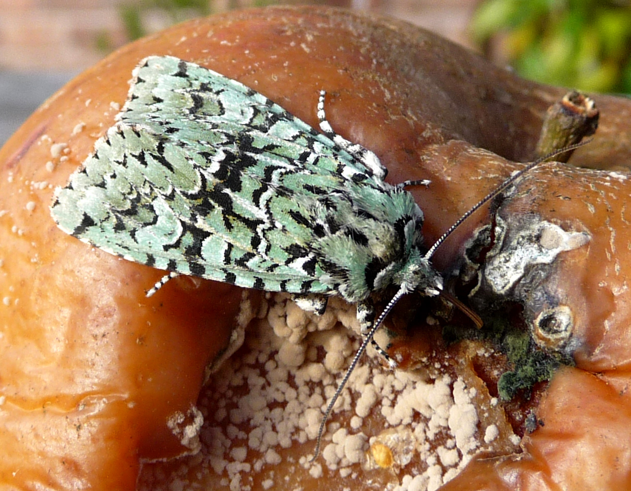 Merveille du jour. Dichomnia aprilina, feeding on apple.